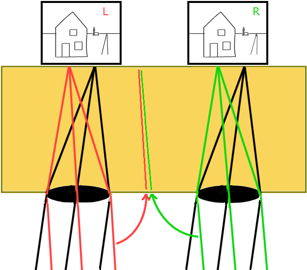 Steroscoop